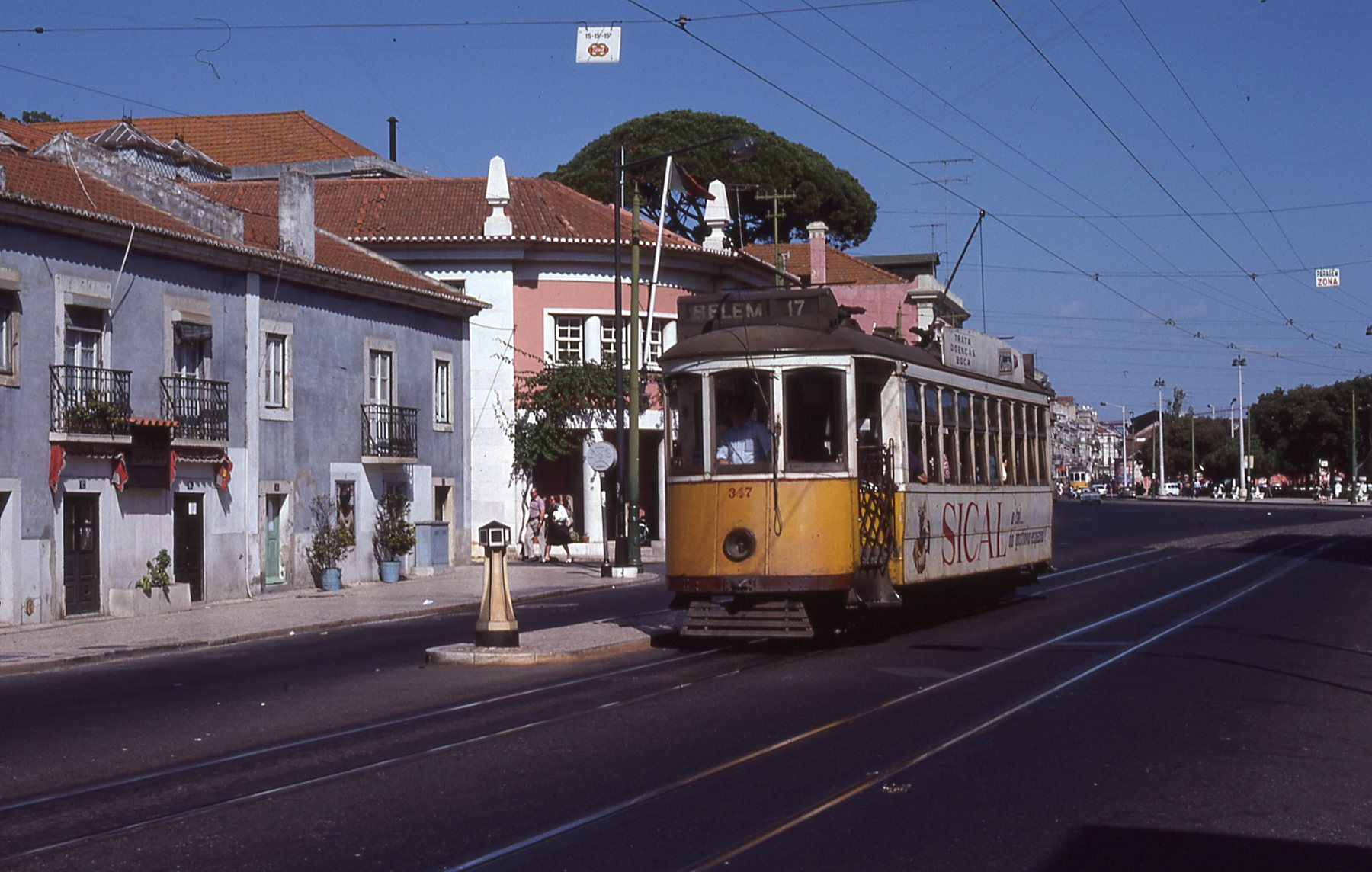 Photo: Trams aux Fils. Ligne 17 direction BELEM, tram 347 en 1977 (ligne disparue le 05-05-1997) Le tram 347 fait partie de la série 343 - 362. (pas de nouvelle à son sujet). Il existe encore de cette série le tram 348 au musée des Trams de Lisbonne et les trams 351 - 353 - 359 - 360 - 361 -362 chez des particuliers. Les trams 344 - 345 - 352 - 354 - 356 - 357 sont démolis.